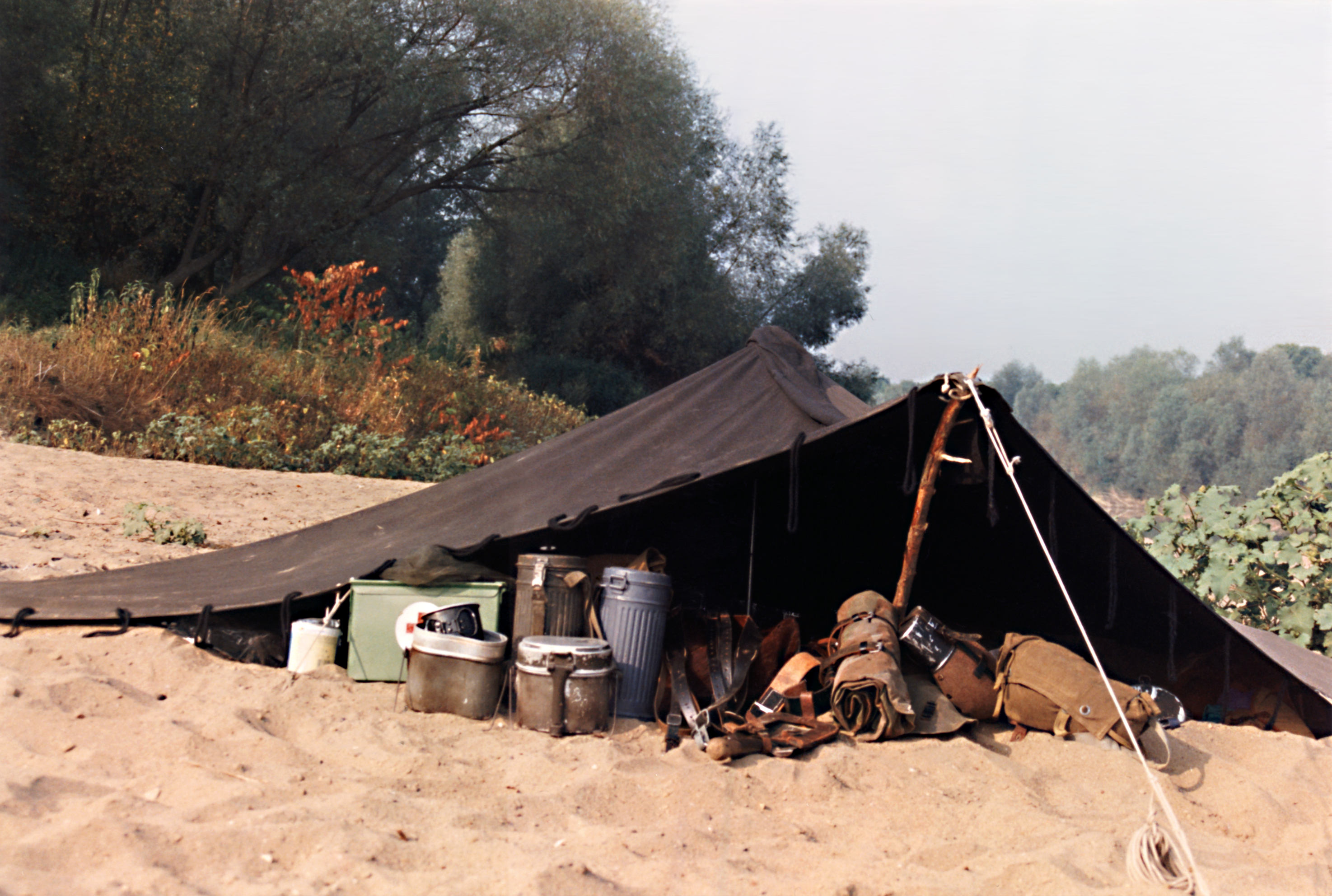 Großfahrt des Pfadfinderstammes Ägypten mit den ungarischen Pfadfindern der 73. Abteilung „Weißer Hirsch“ aus Tapolca. Fünf Tage lang fuhren beide Gruppen im Sommer 1992 entlang des nordostungarischen Oberlaufs der Theiß von Tiszabecs nach Gergelyiugornya. Anschließend gestaltete der Stamm Ägypten sein eigenes Programm. Ausgangspunkt war dabei stets das Anwesen von Dr. József Nagy (von 1990 bis 1992 Bürgermeister von Tapolca) – Nagymalom – bei Törekpuszta südlich von Tapolca. Im Bild: Nachtlager vom 15. auf den 16. August für zwei Personen am Flußufer der Theiß aus zwei Kohtenbahnen.